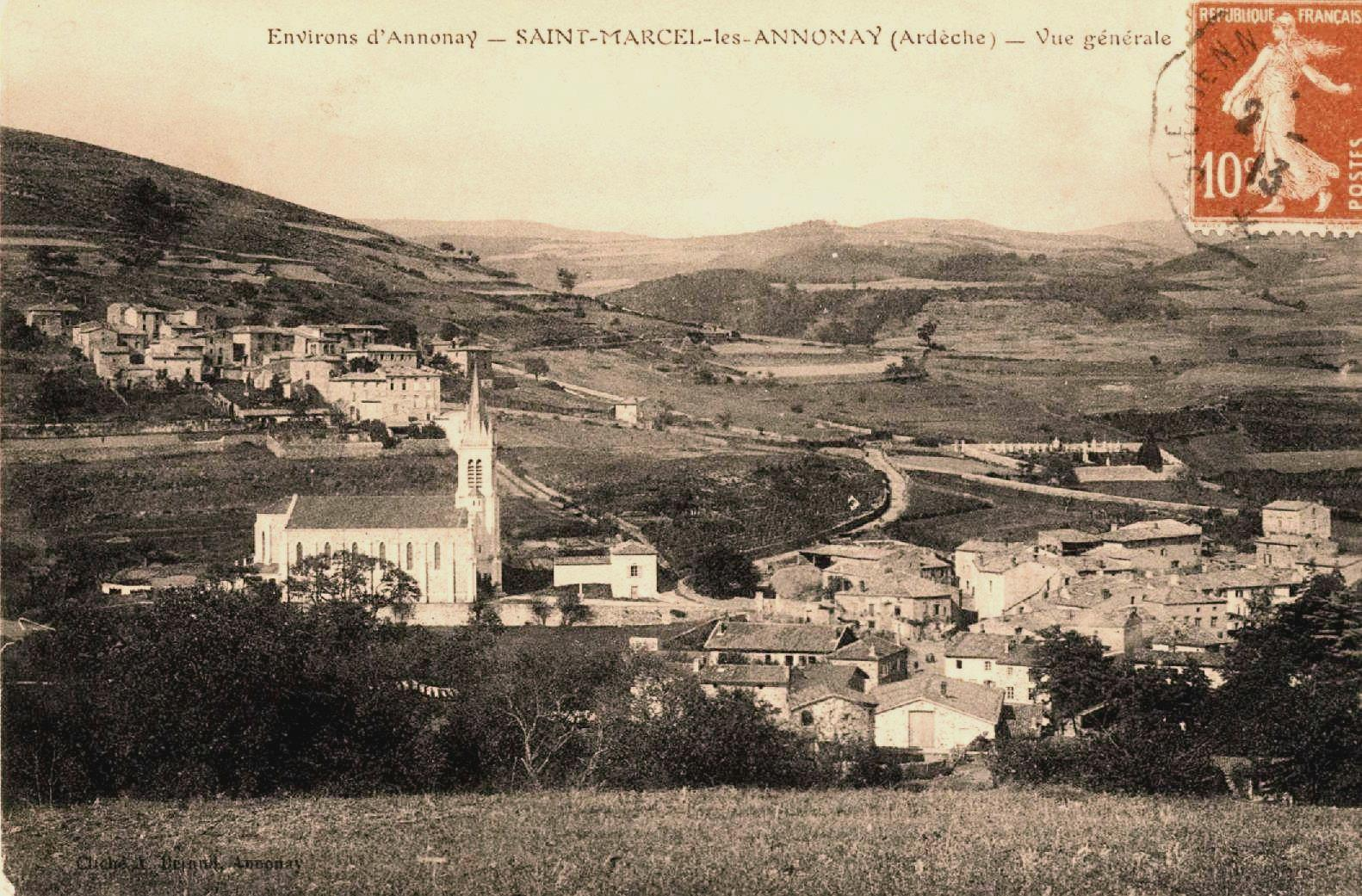 Saint-Marcel-lès-Annonay vue générale